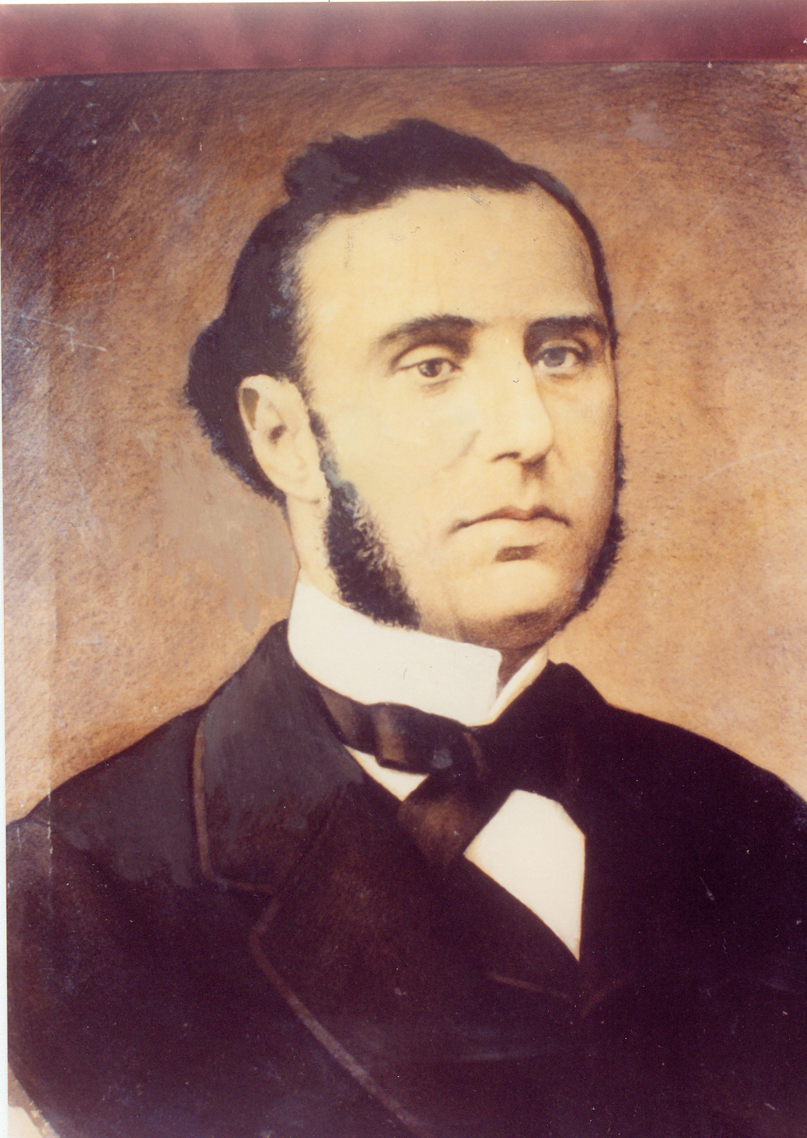 José Gil y Serra, empresario español (1815-1877)